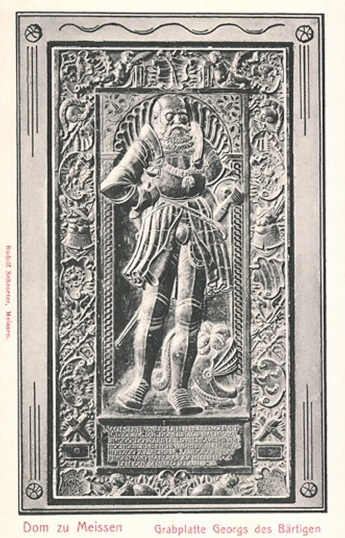 Grabplatte Georgs des Bärtigen im Meißner Dom; Postkarte vor 1914; vgl. Beschreibung (TU Dresden)